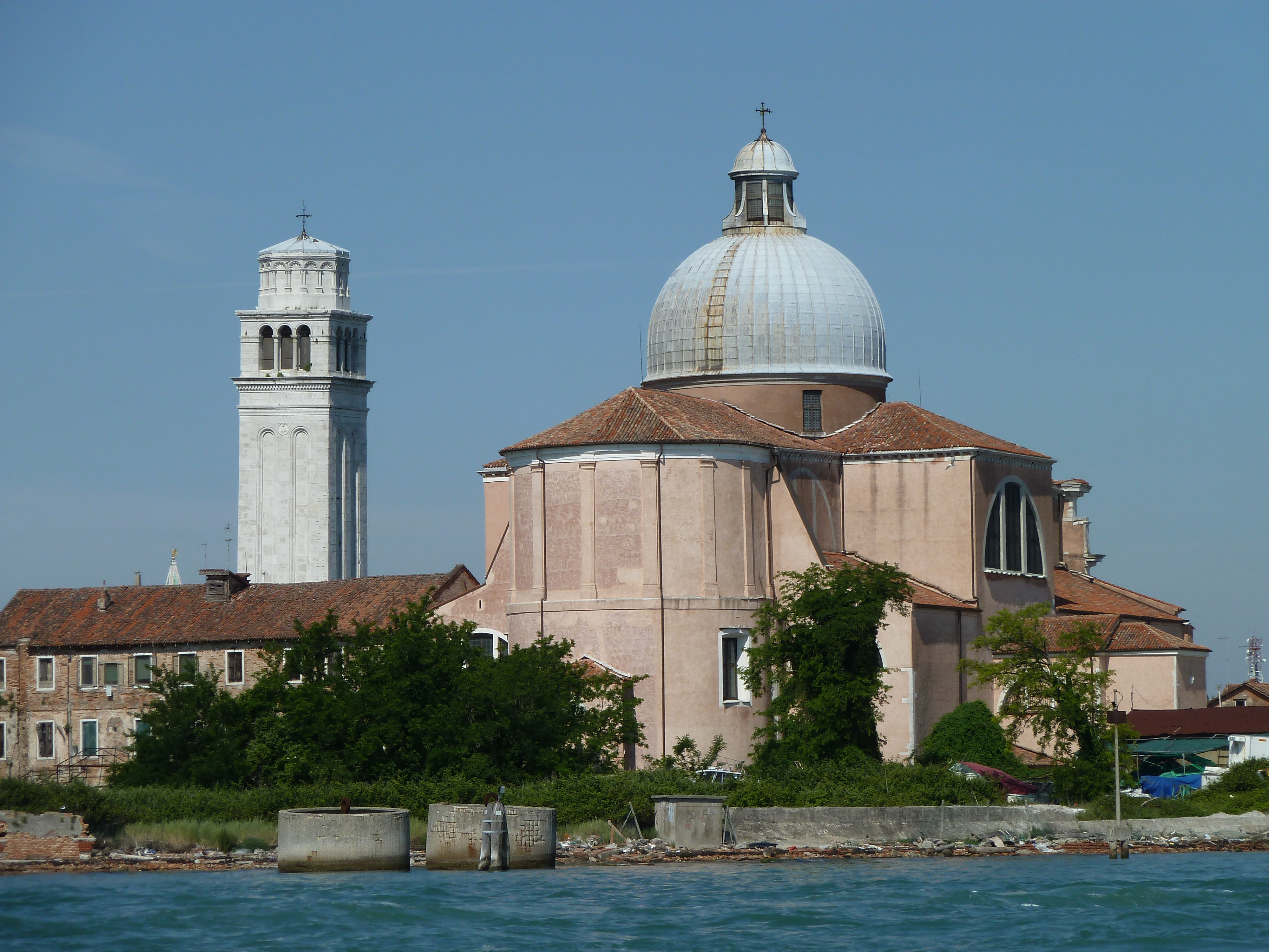 San Pietro di Castello (Venice)